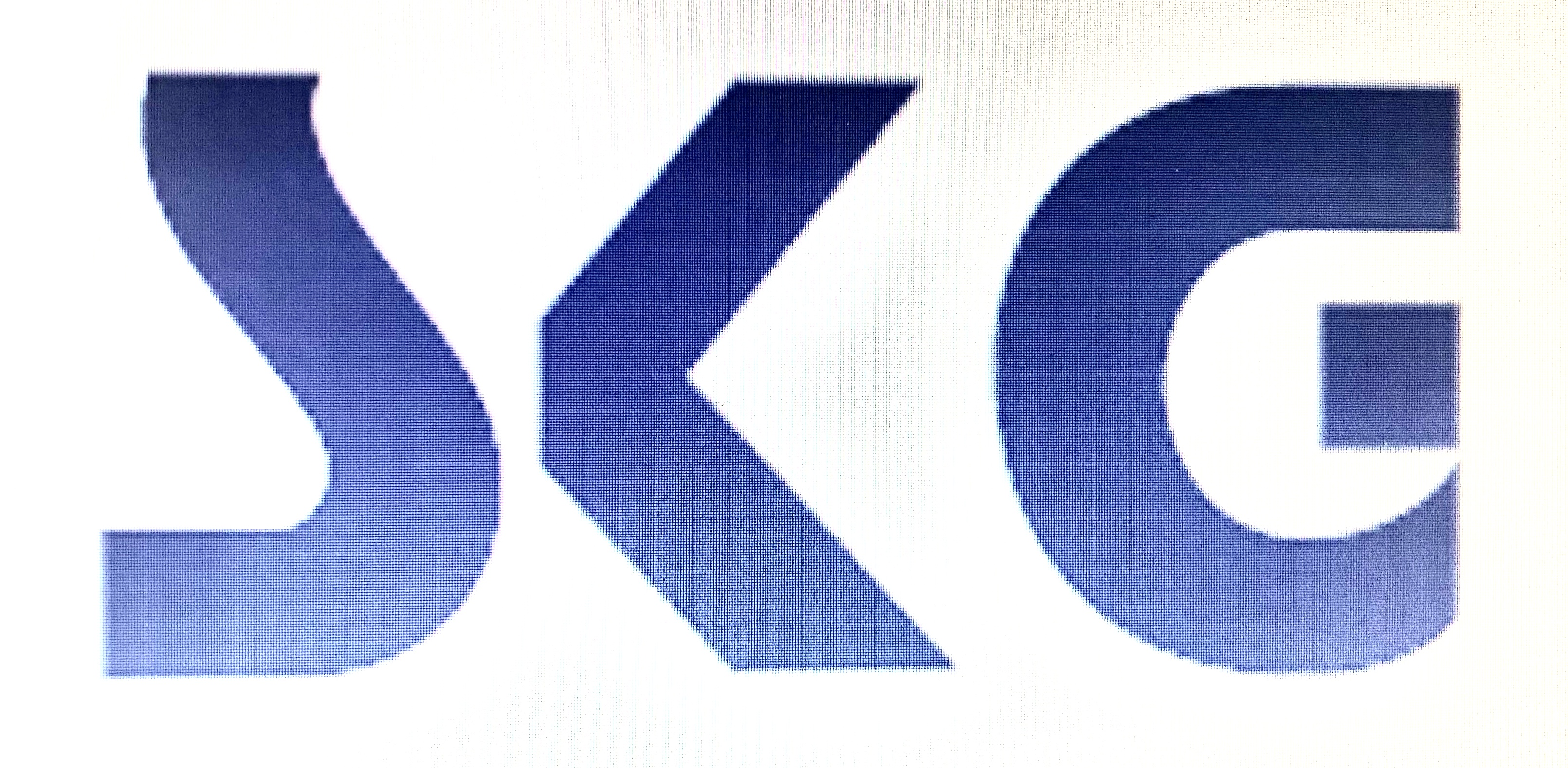 Logo der SKG e.V.